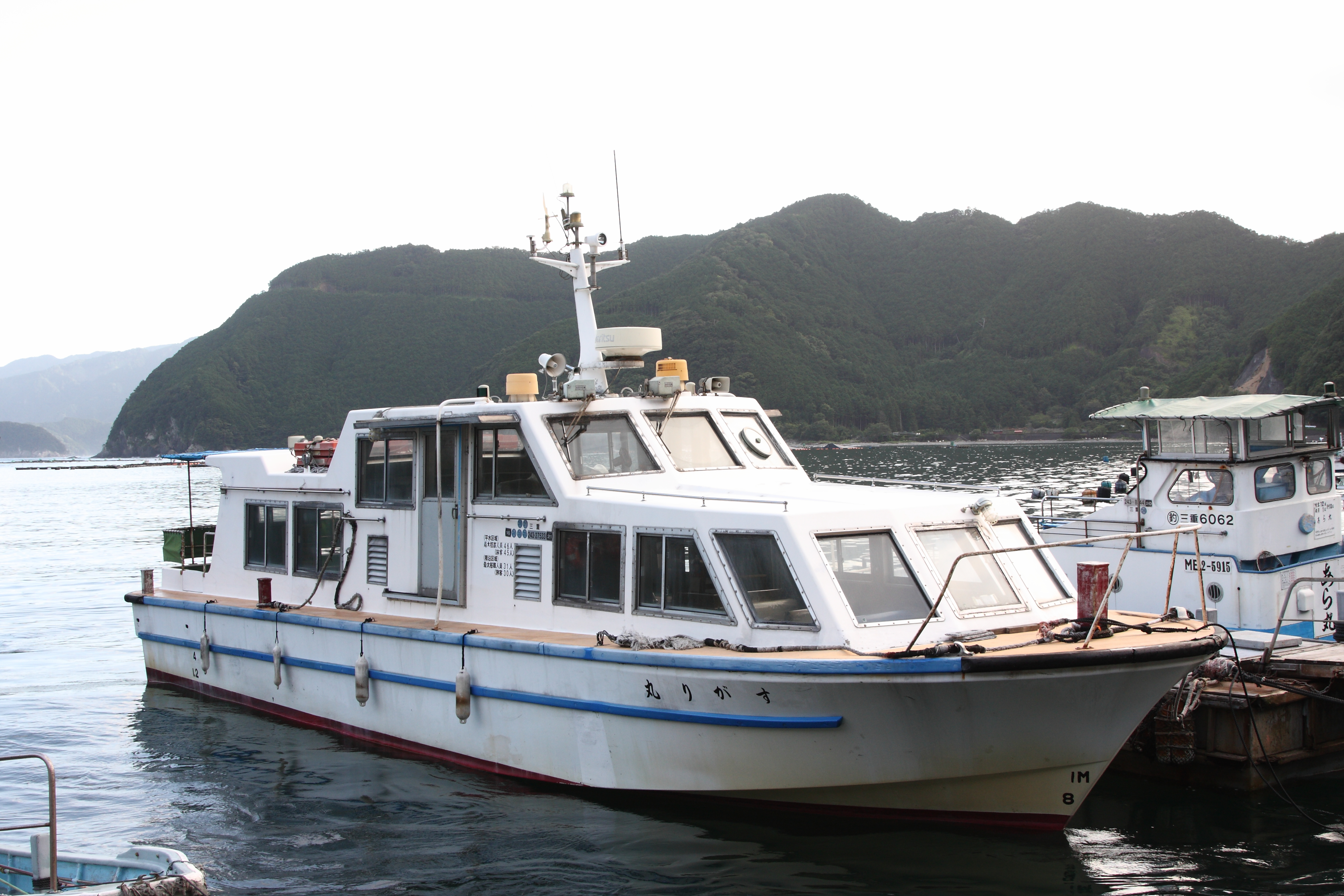 須賀利側